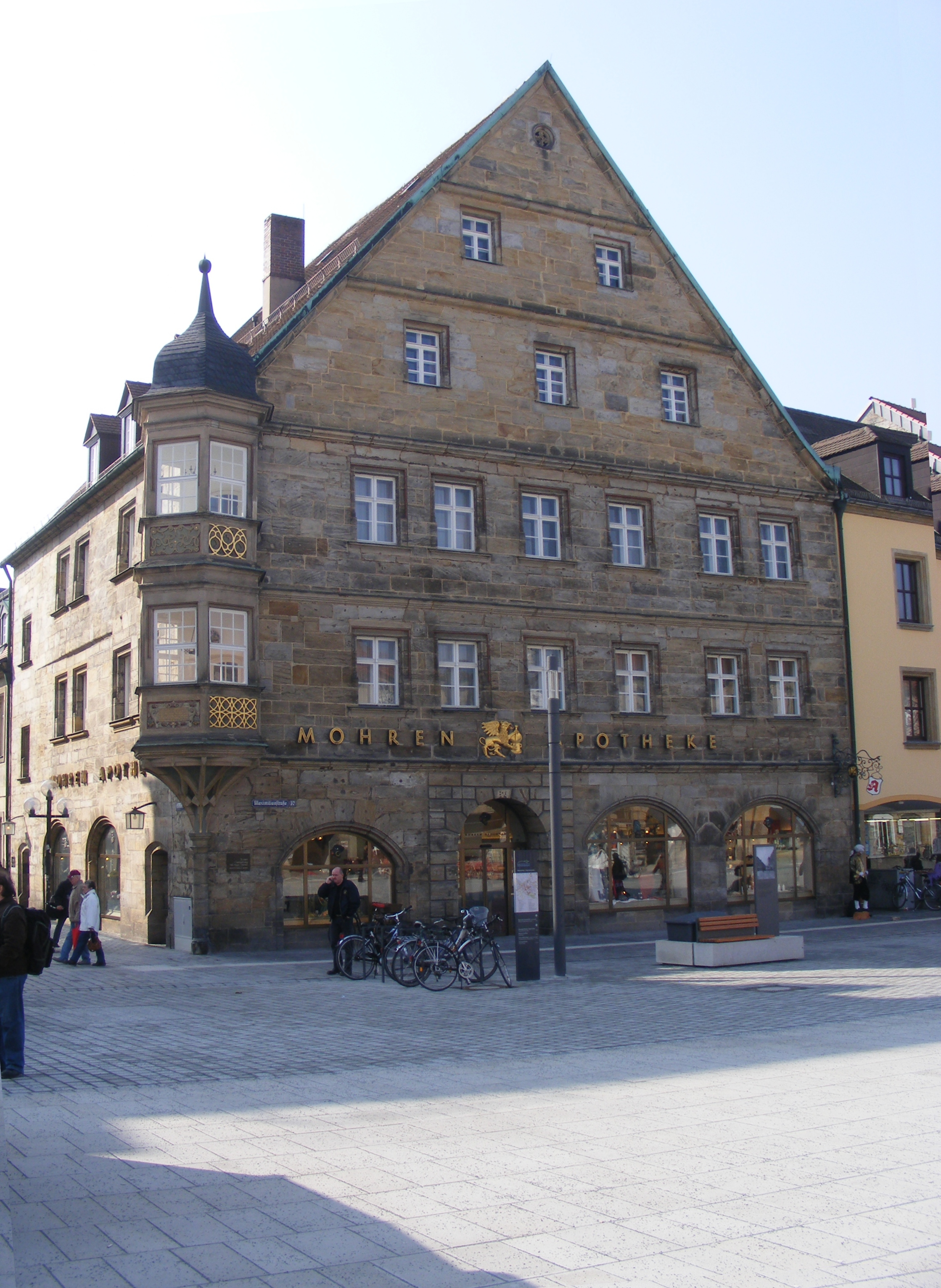 Bayreuth, Mohren-Apotheke (Gebäude)